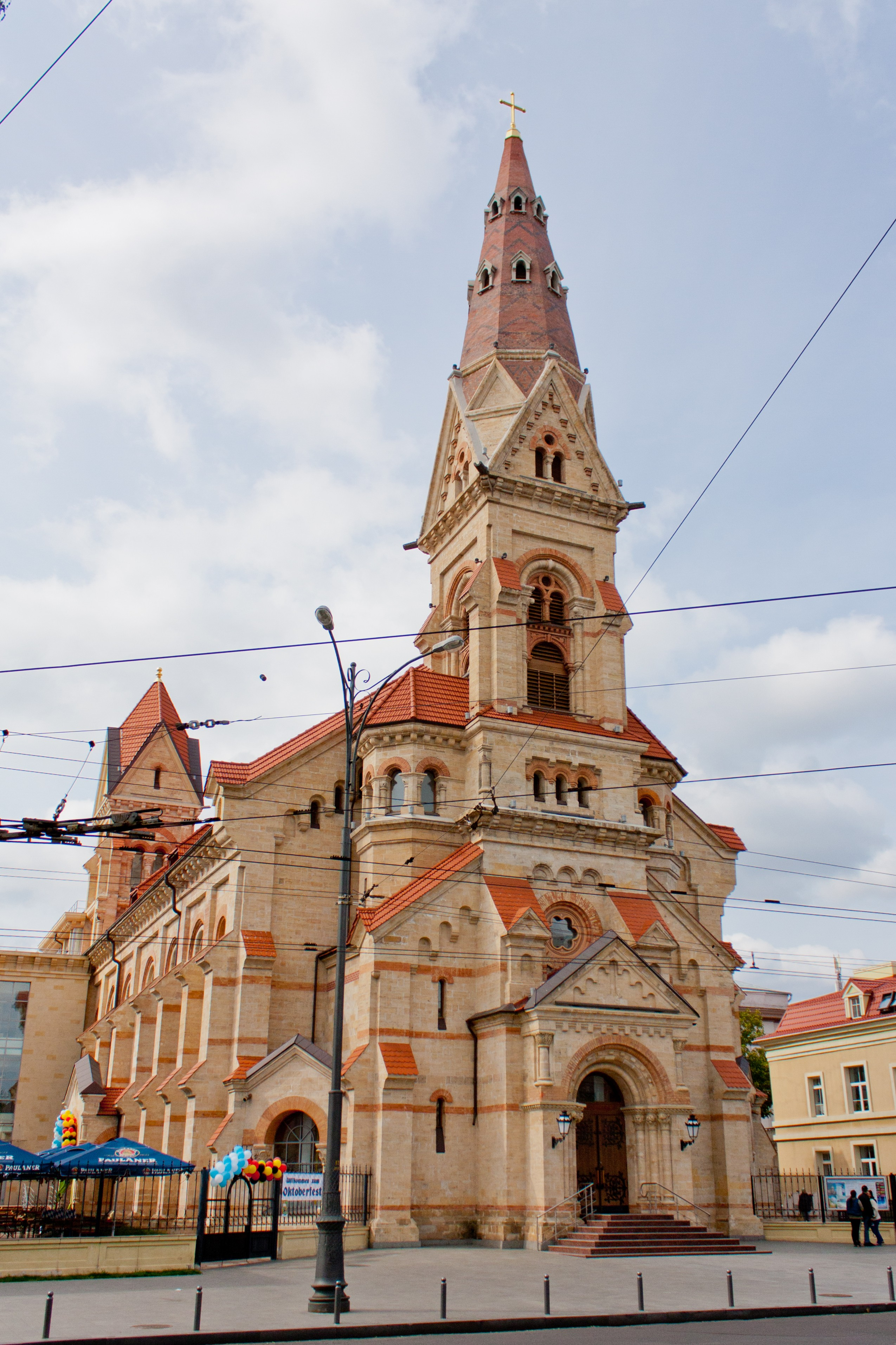 Будинок Кірхи (Лютеранська церква св. Павла), Одеса, Новосельського вул., 68